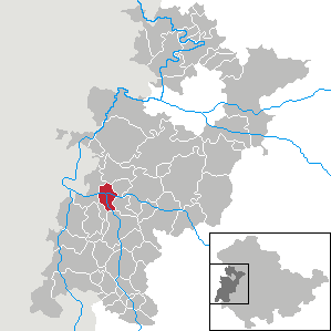 Dorndorf in Thuringia - Wartburgkreis